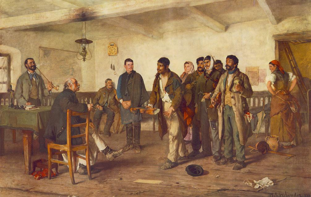 Bihari Sándor: Bíró előtt (1886 - olaj, vászon, 111,2x167 cm, Magyar Nemzeti Galéria, Forrás-SzSzK)